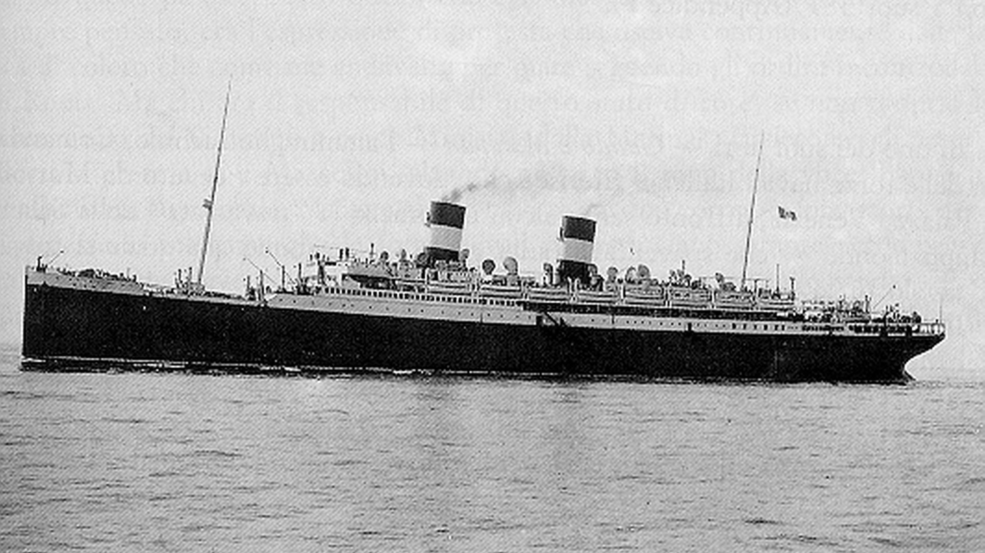 Il transatlantico Roma prima della trasformazione in portaerei